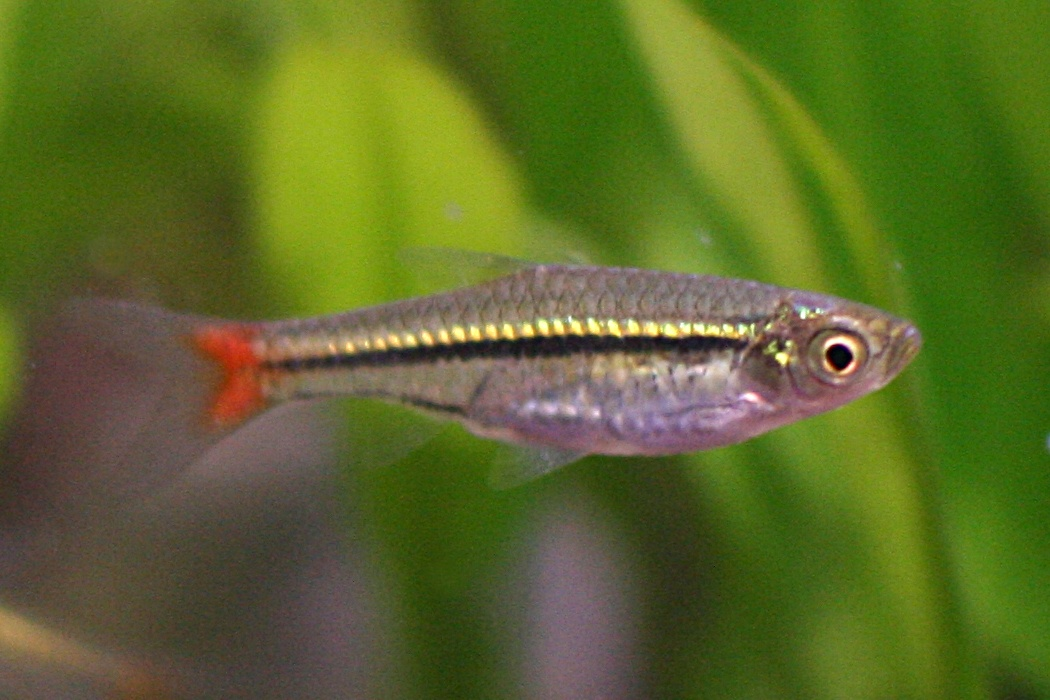 Blackline rasbora Rasbora borapetensis